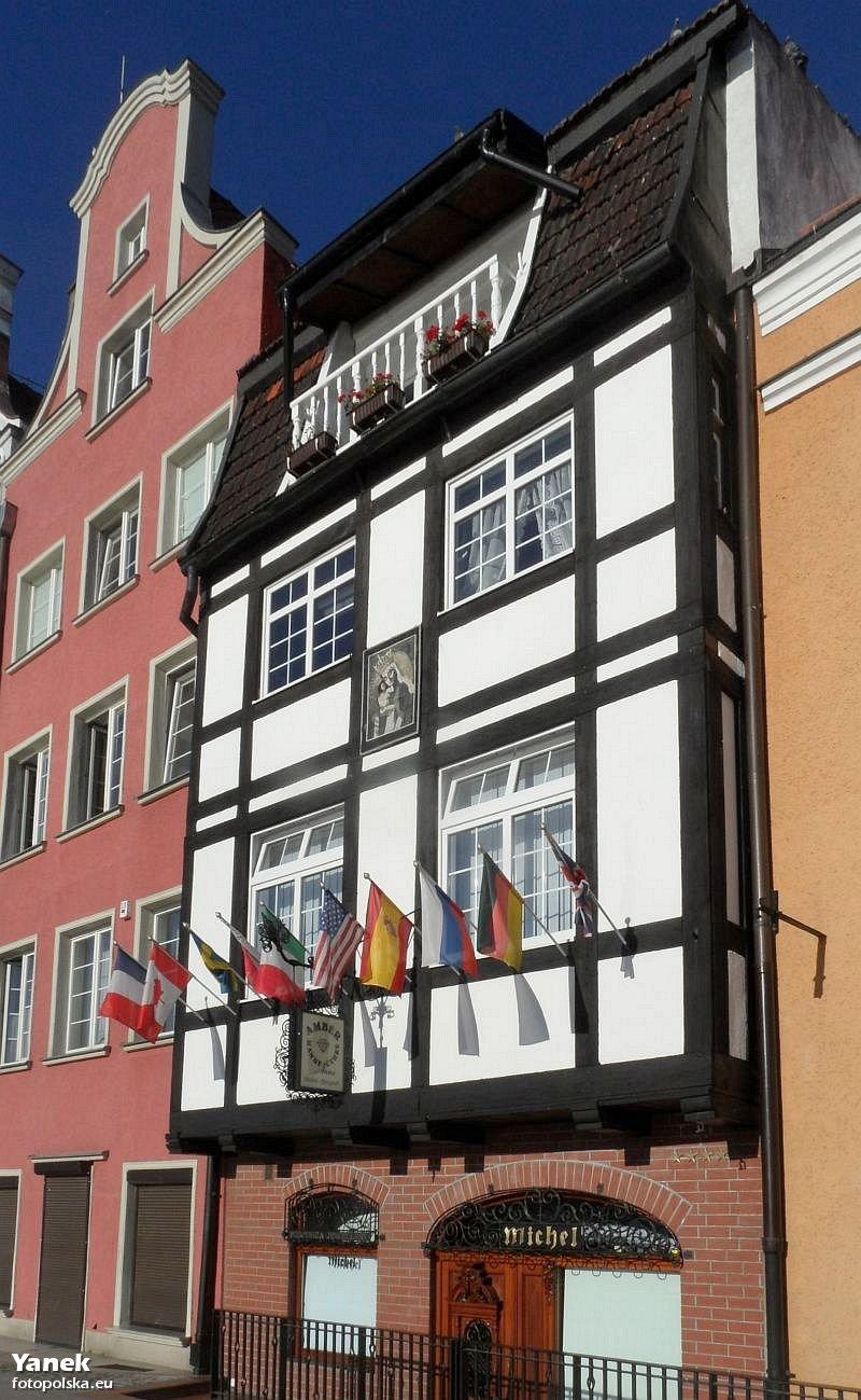 Kamieniczka przy Długim Pobrzeżu. Miejsce gdzie mieszka jeden z odbudowujących (jednocześnie kontrowersyjny wg wielu z SSC) Główne Miasto, czyli architekt Stanisław Michel.